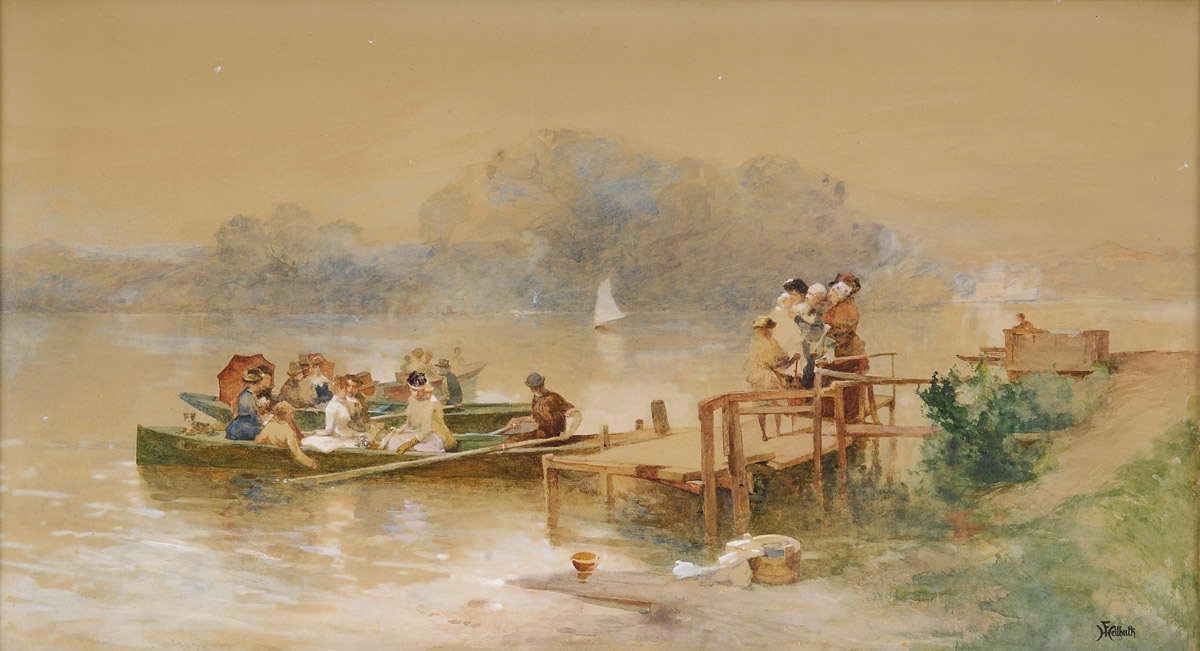 Der Bootsausflug. Signiert. Gouache. 36 x 66 cm